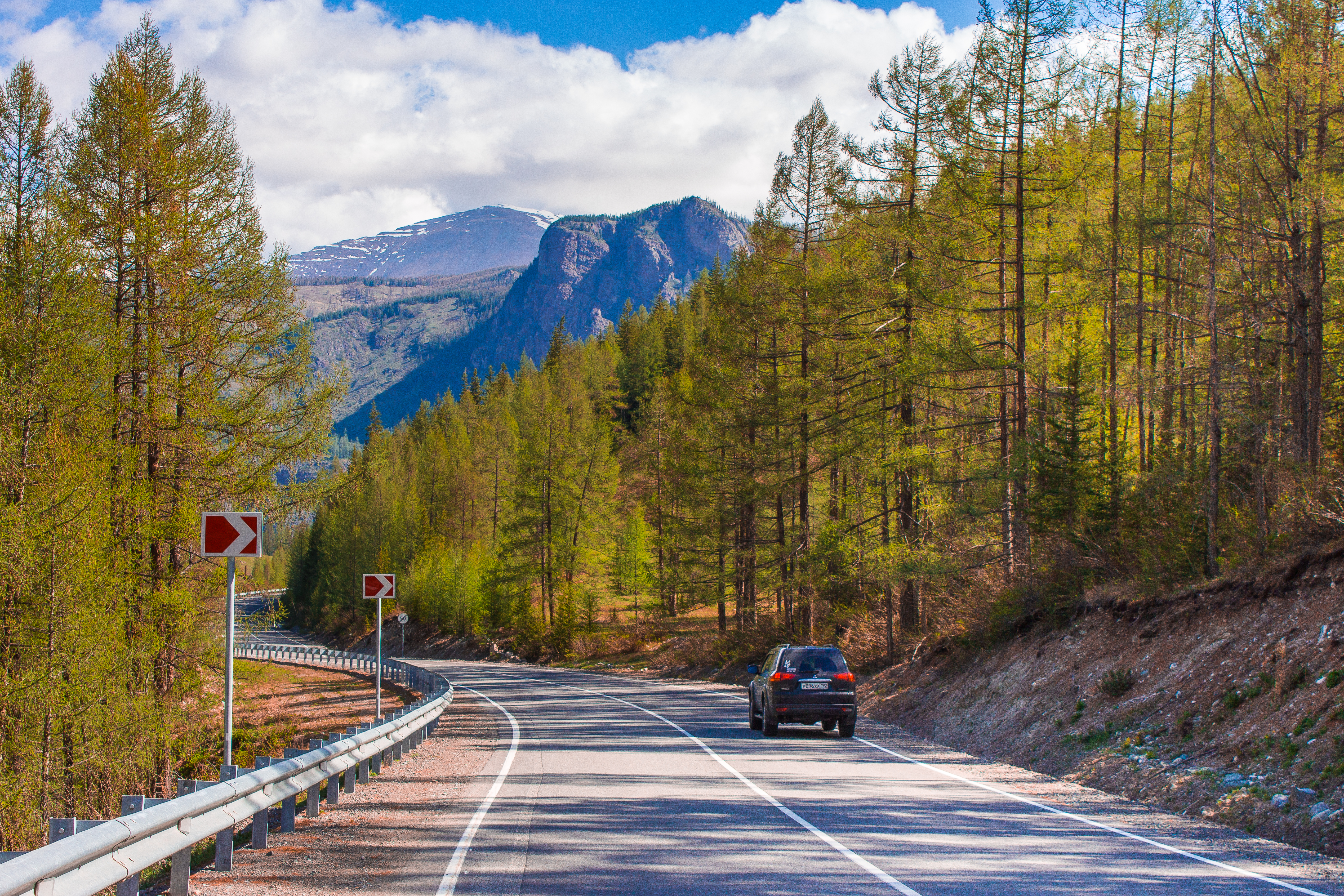 Федеральная дорога Р-256 "Чуйский тракт". Горныйй Алтай